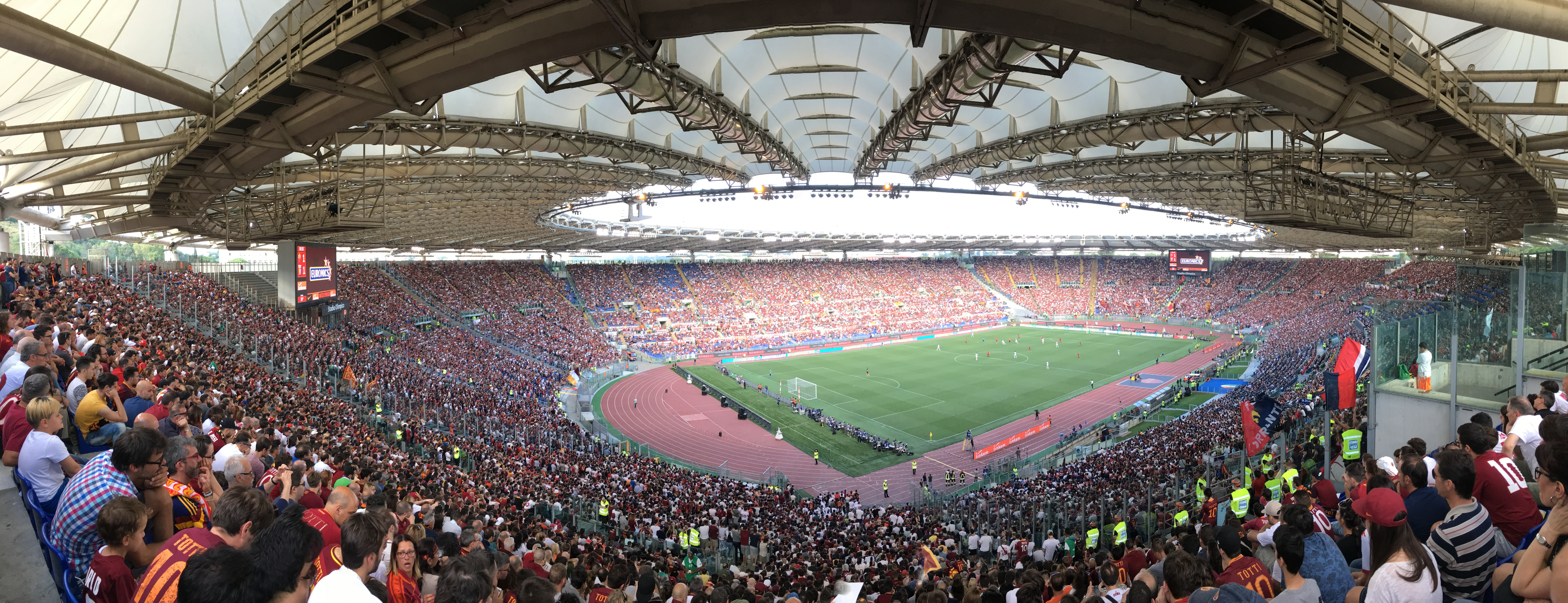 Panoramica dello stadio gremito scattata dal settore distinti nord-ovest in occasione della partita di calcio Roma-Genoa del 28/05/2017, durante l'ultima partita di Francesco Totti con la maglia della Roma.